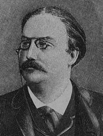 Franz Koppel-Ellfeld (1838-1920), German poet and dramaturge